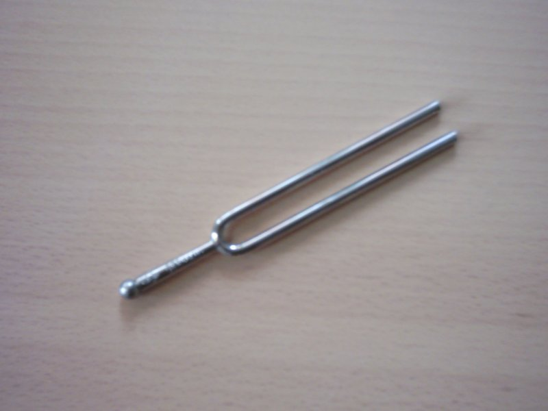 Diapasón afinado a 440Hz Diapasón 440Hz